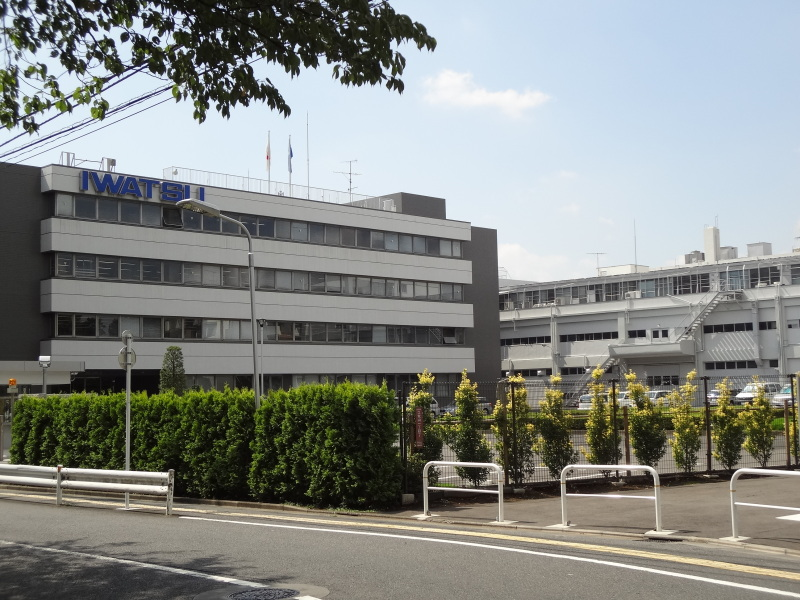 岩崎通信機本社ビル